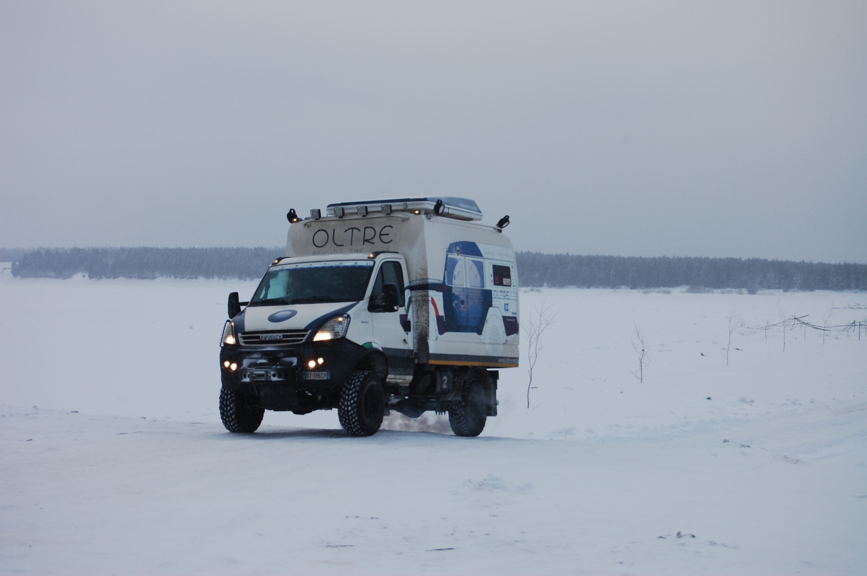 daily durante un attraversamento di un fiume ghiacciato